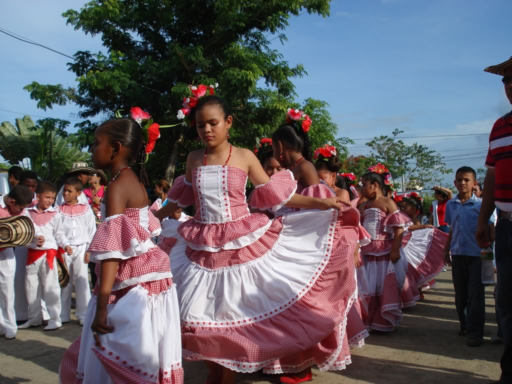 Niños bailando cumbia en San Pelayo, Cordoba. Colombia